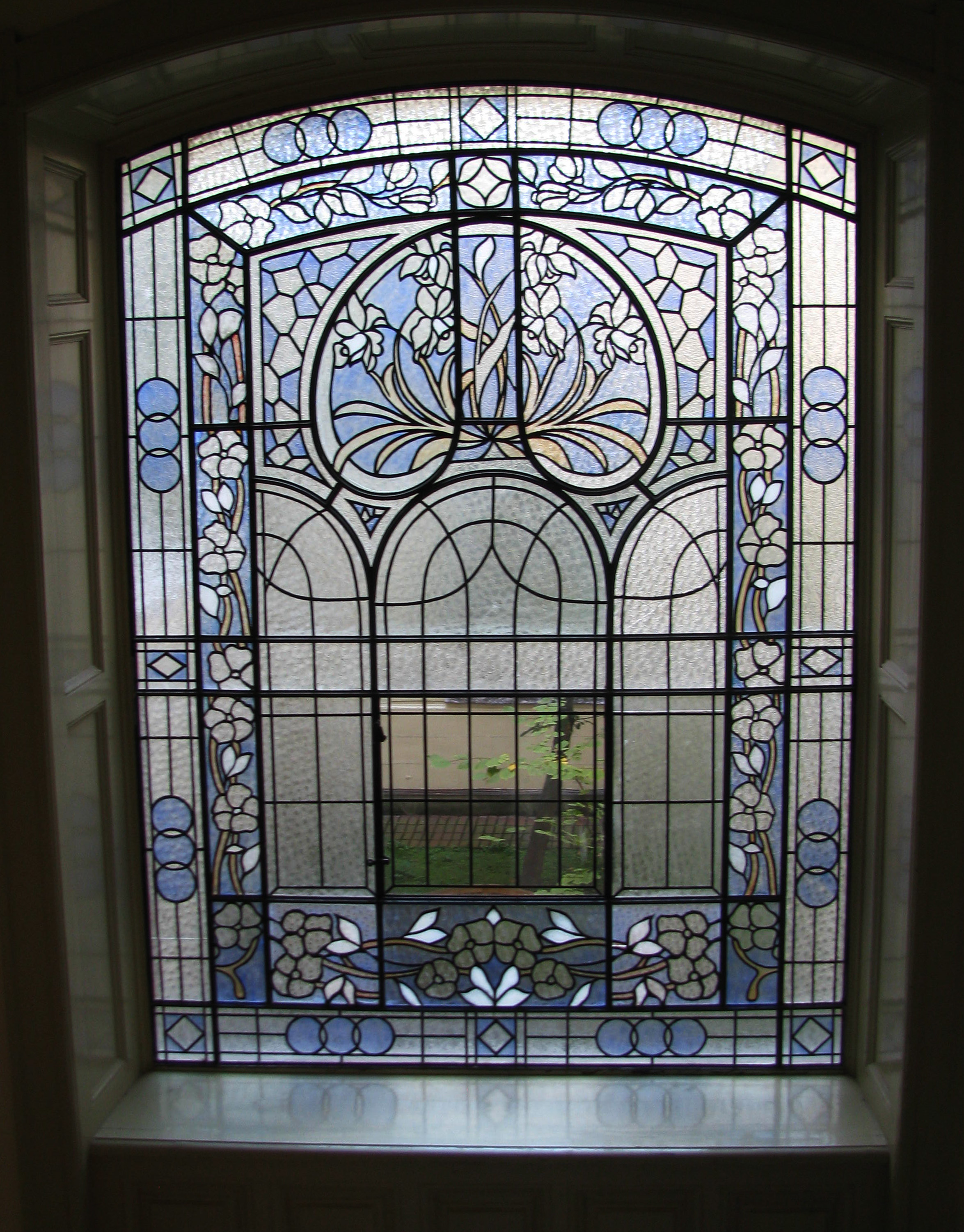 Будинок по вулиці Богомольця, 6 (Львів). Запроектований архітектурно-будівничим бюро Івана Левинського. Вітражне панно у під'їзді будинку.